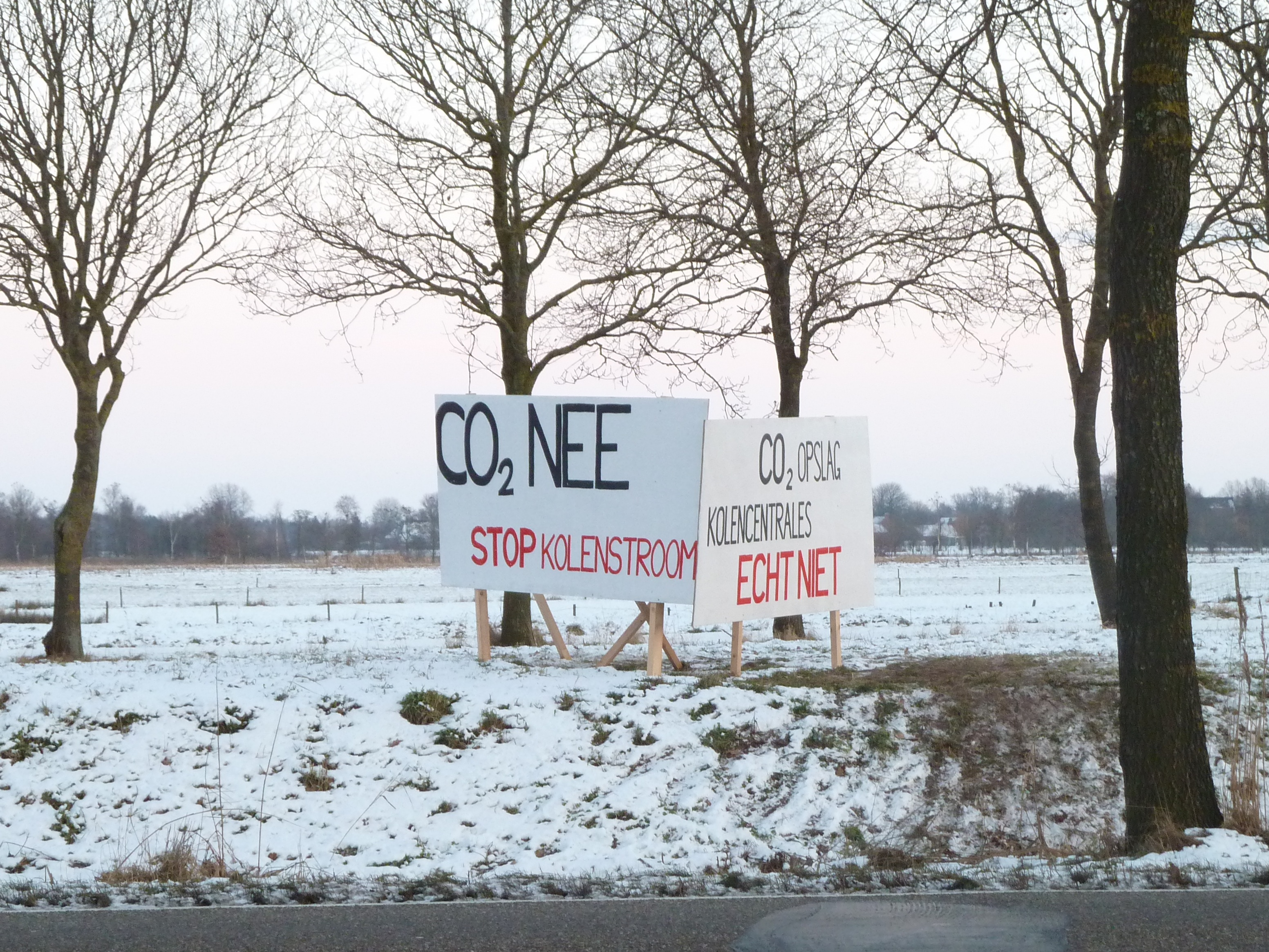 Protestbord tegen CO2-opslag onder Sebaldeburen aan de weg van Grijpskerk naar Sebaldeburen.